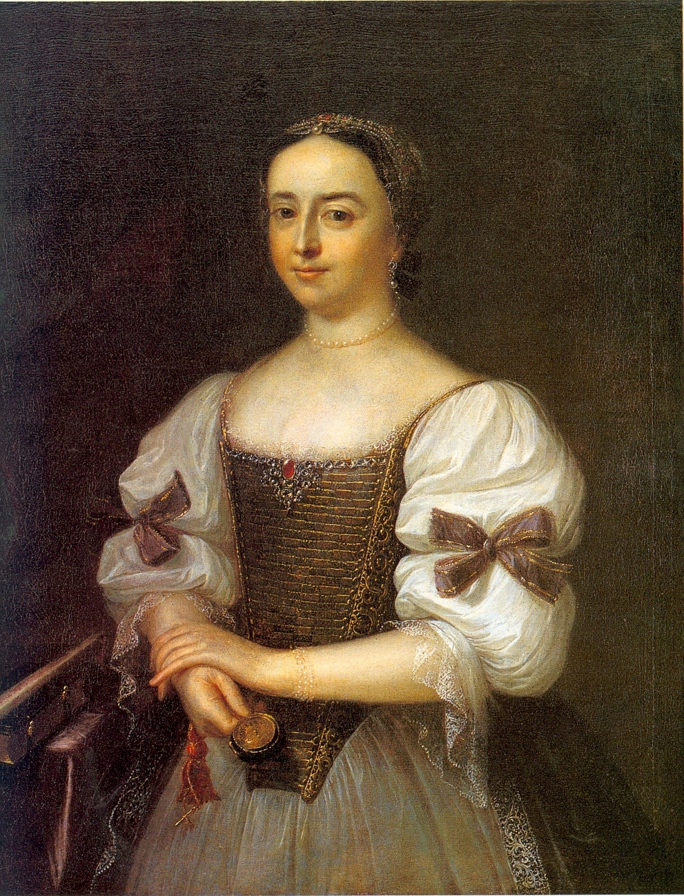 Kajali Klára, Ráday Pál (Losonc, 1677. július 2. – Pécel, 1733. május 20.) kancellár feleságe.